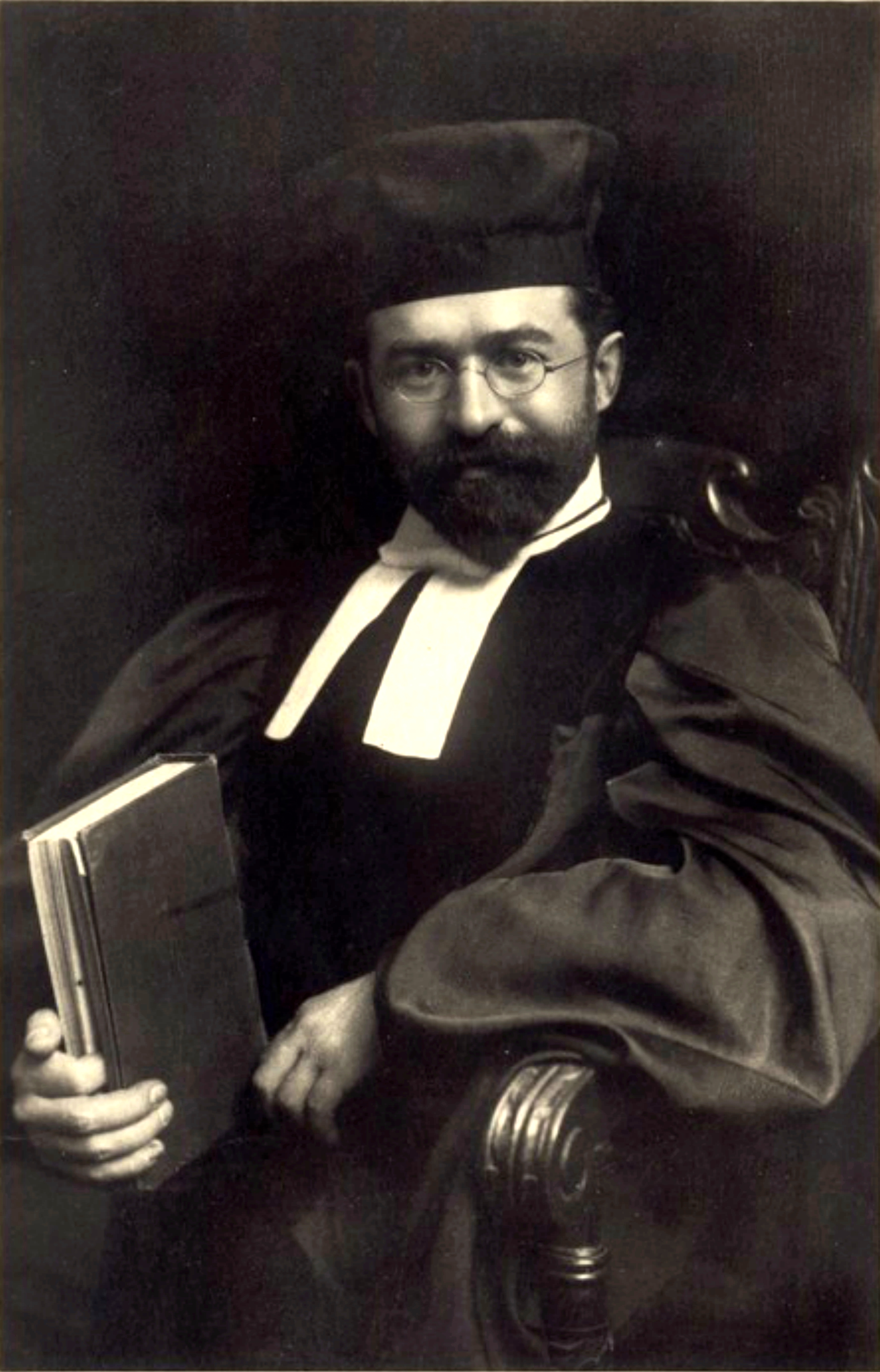 גלויה ובה דיוקן הרב הרץ בישיבה, בתלבושתו הרשמית. הגלויה הופקה בבריטניה, כנראה בשנות העשרה של המאה העשרים.